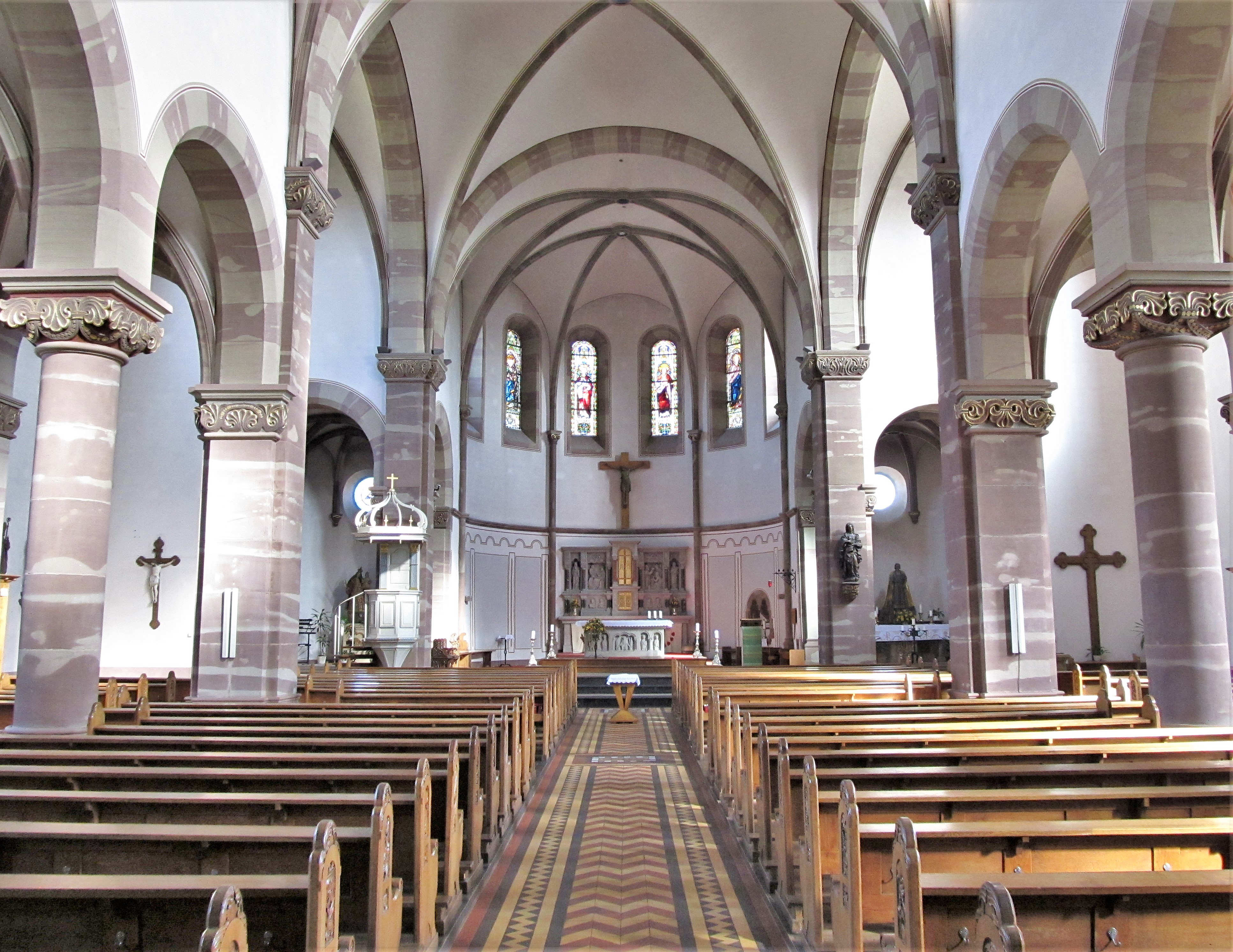 Blick ins Innere der katholischen Pfarrkirche St. Agatha in Kleinblittersdorf, Regionalverband Saarbrücken, Saarland